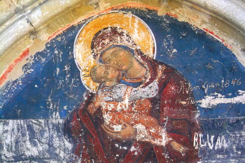 Watra Mołdowica(Vatra Moldoviţei), cerkiew, fresk - Eleusa